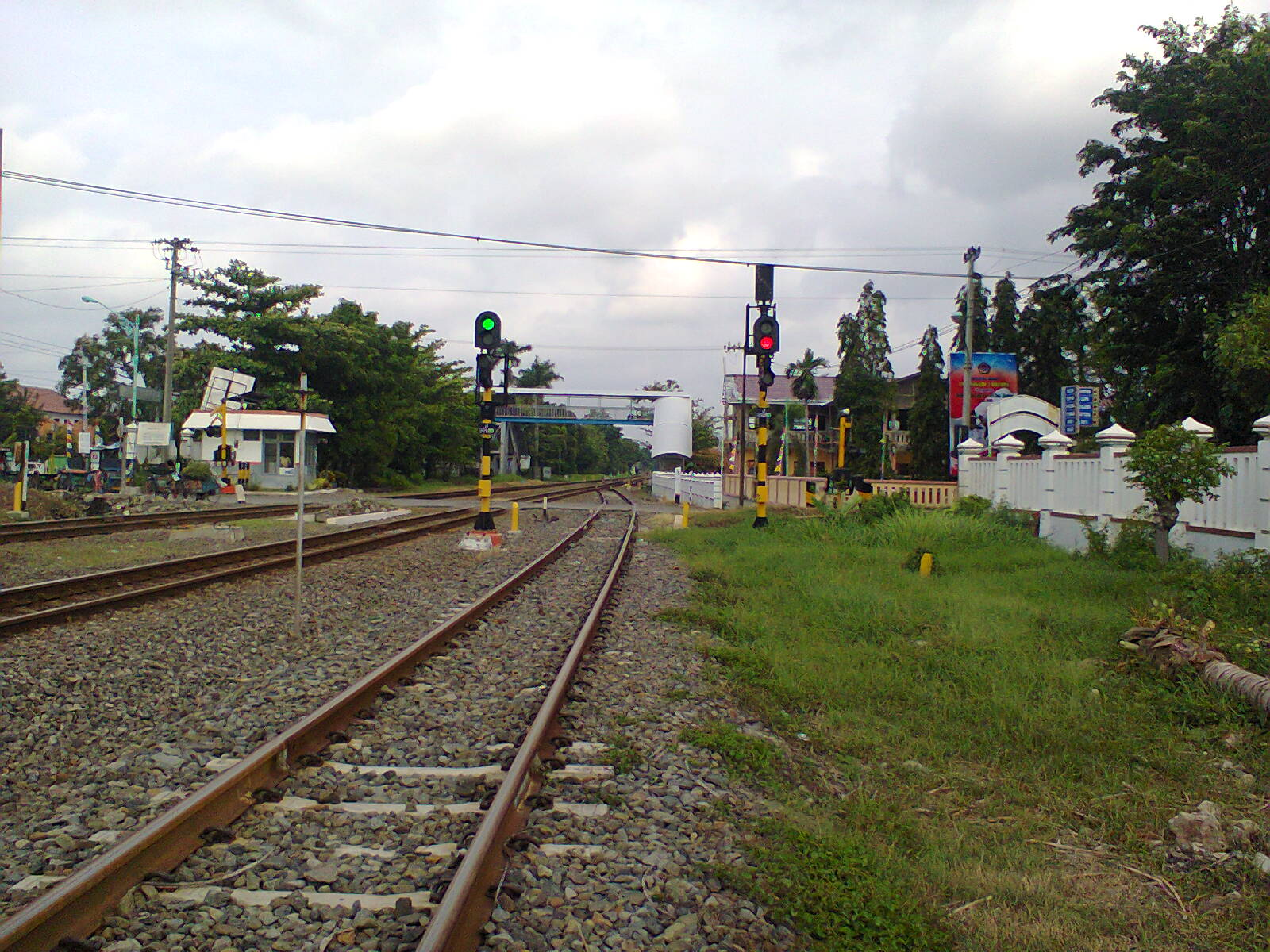 sinyal keluar Stasiun Brebes